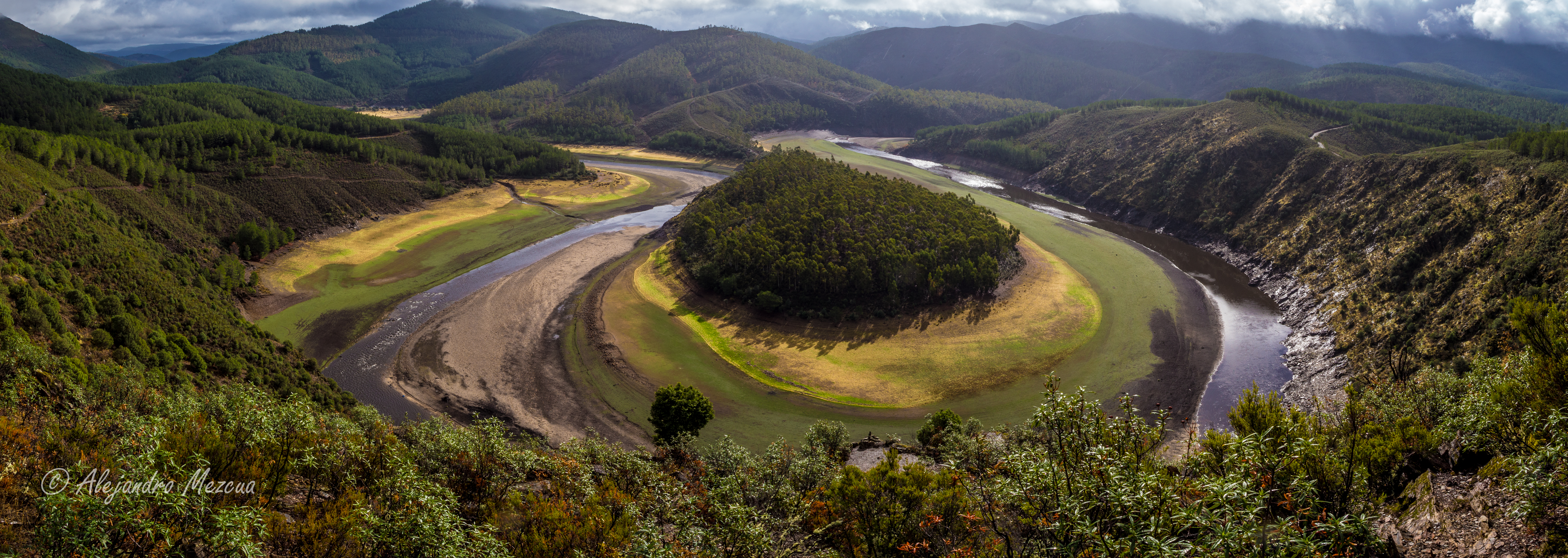 Las Hurdes This is a photography of a Special Area of Conservation in Spain with the ID: ES4320011. Natura2000 entry, EEA entry